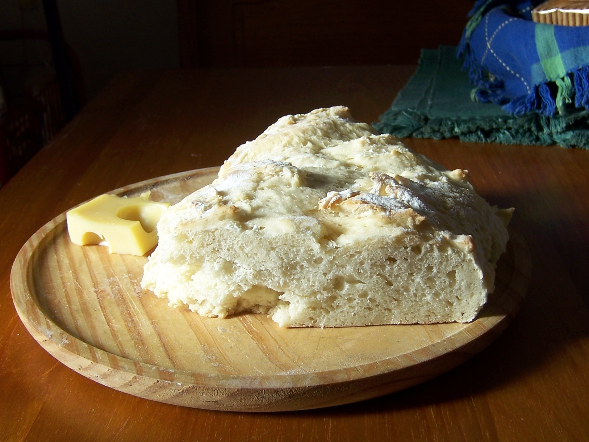 Pan de harina de trigo, hecho en casa.